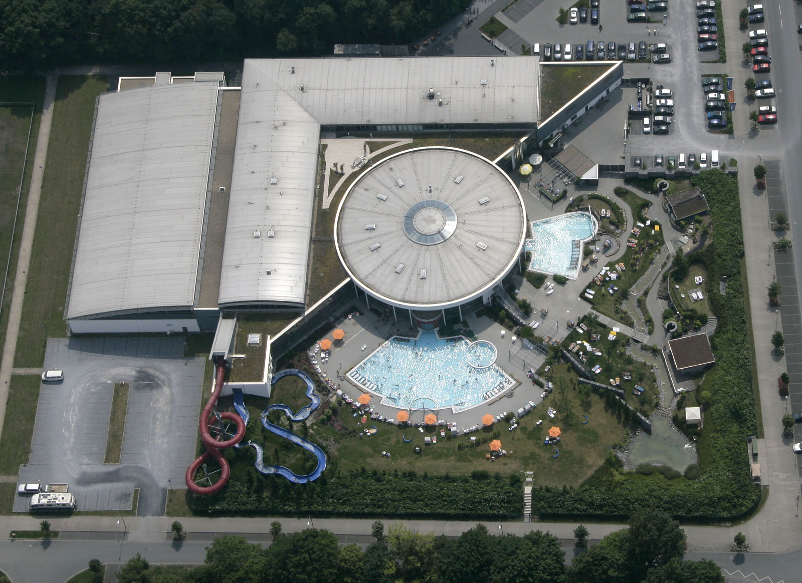 Luftbildaufnahme Hamm: Maximare